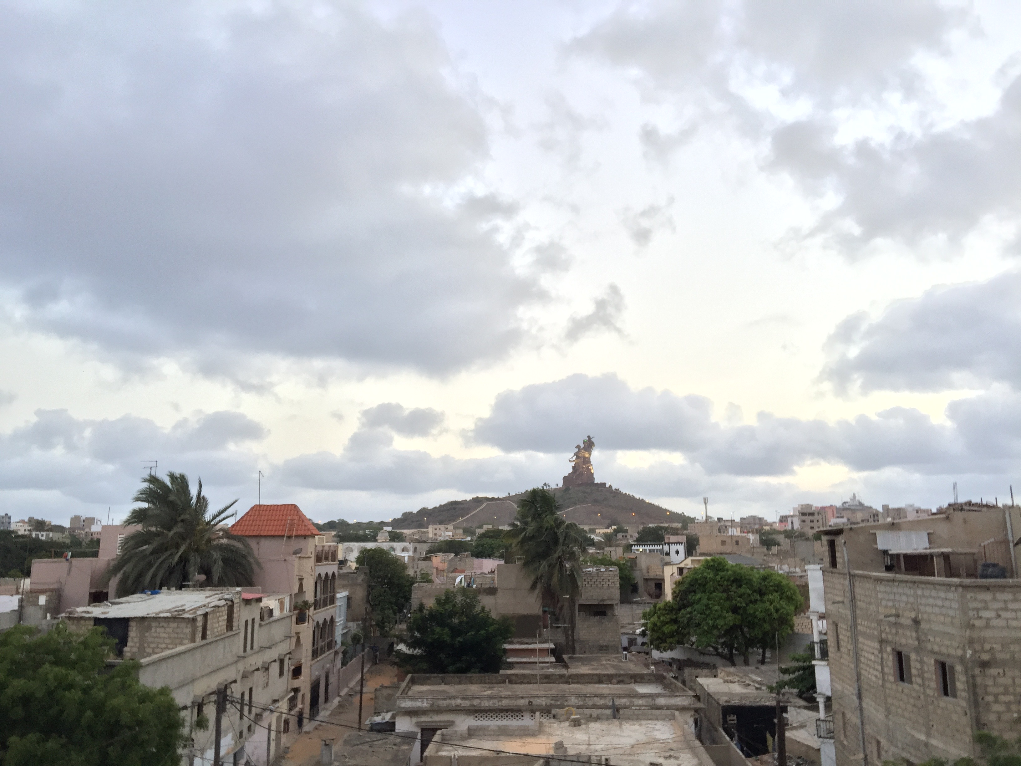 Statue de la renaissance vue de "lati américain" à Ouakam